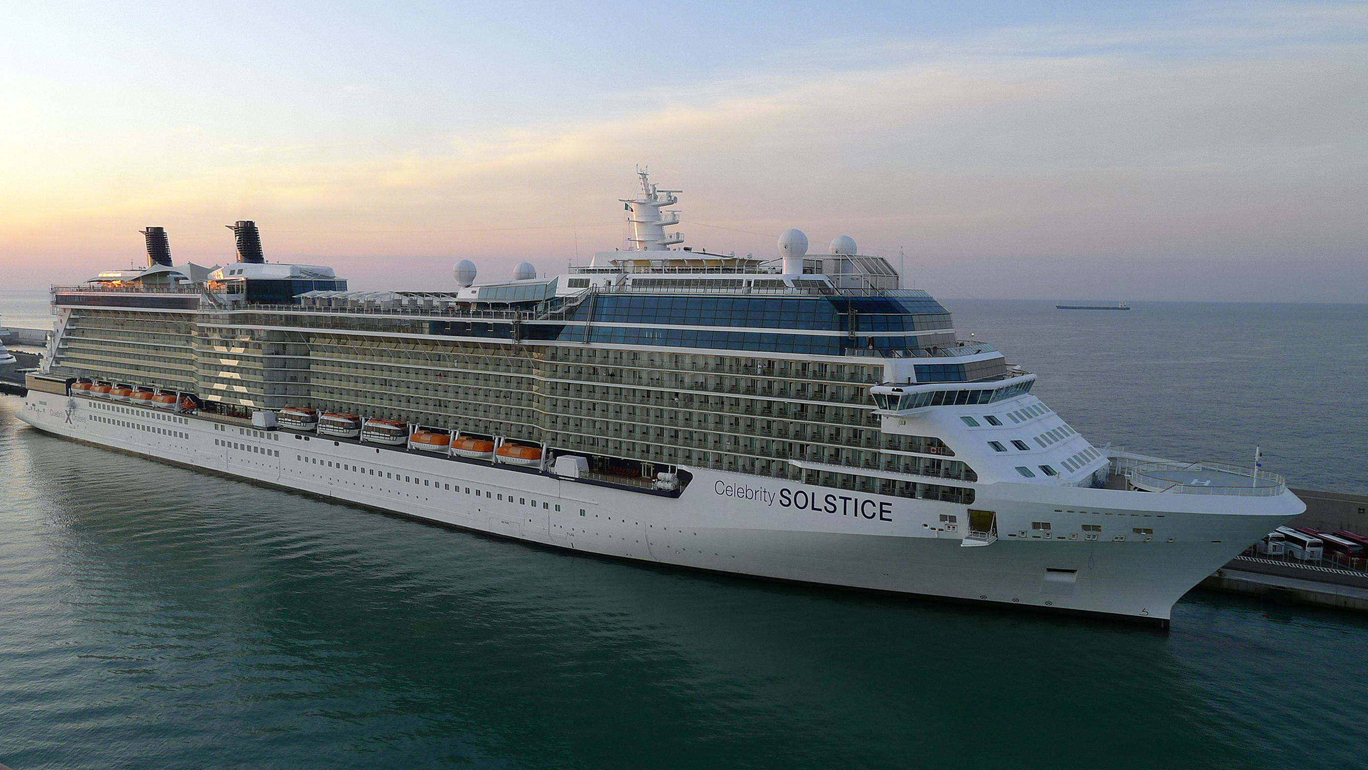 Celebrity Solstice in Civitavecchia, Lazio, Italy